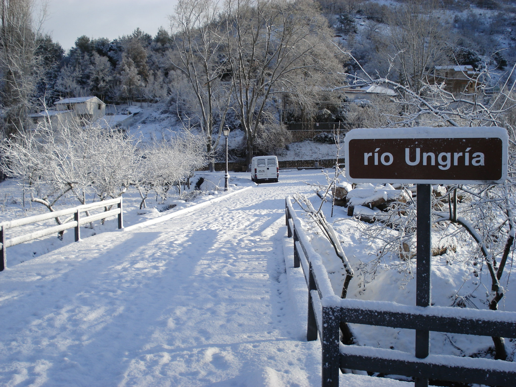 Bajo el nevado puente, el río Ungría a su paso por Caspueñas.